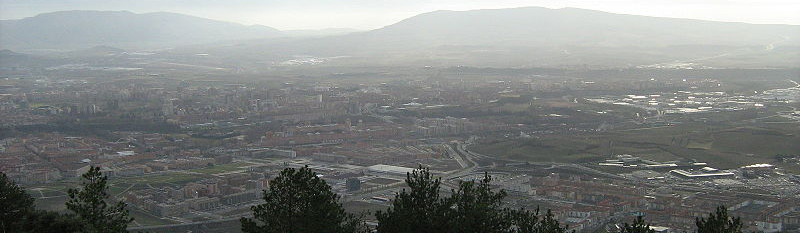 Vista pnorámica de la ciudad de Pamplona desde el monte Ezcaba o San Cristobal